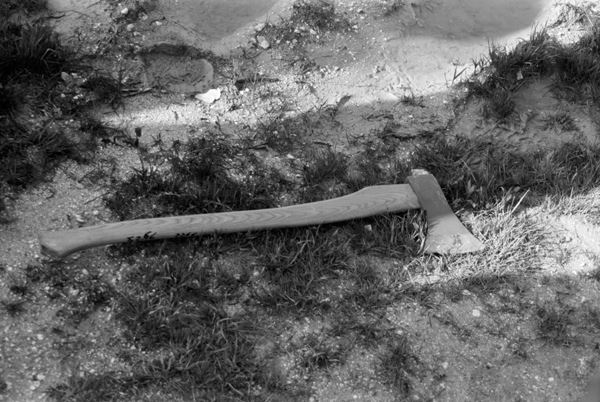 ליל הקילשונים.